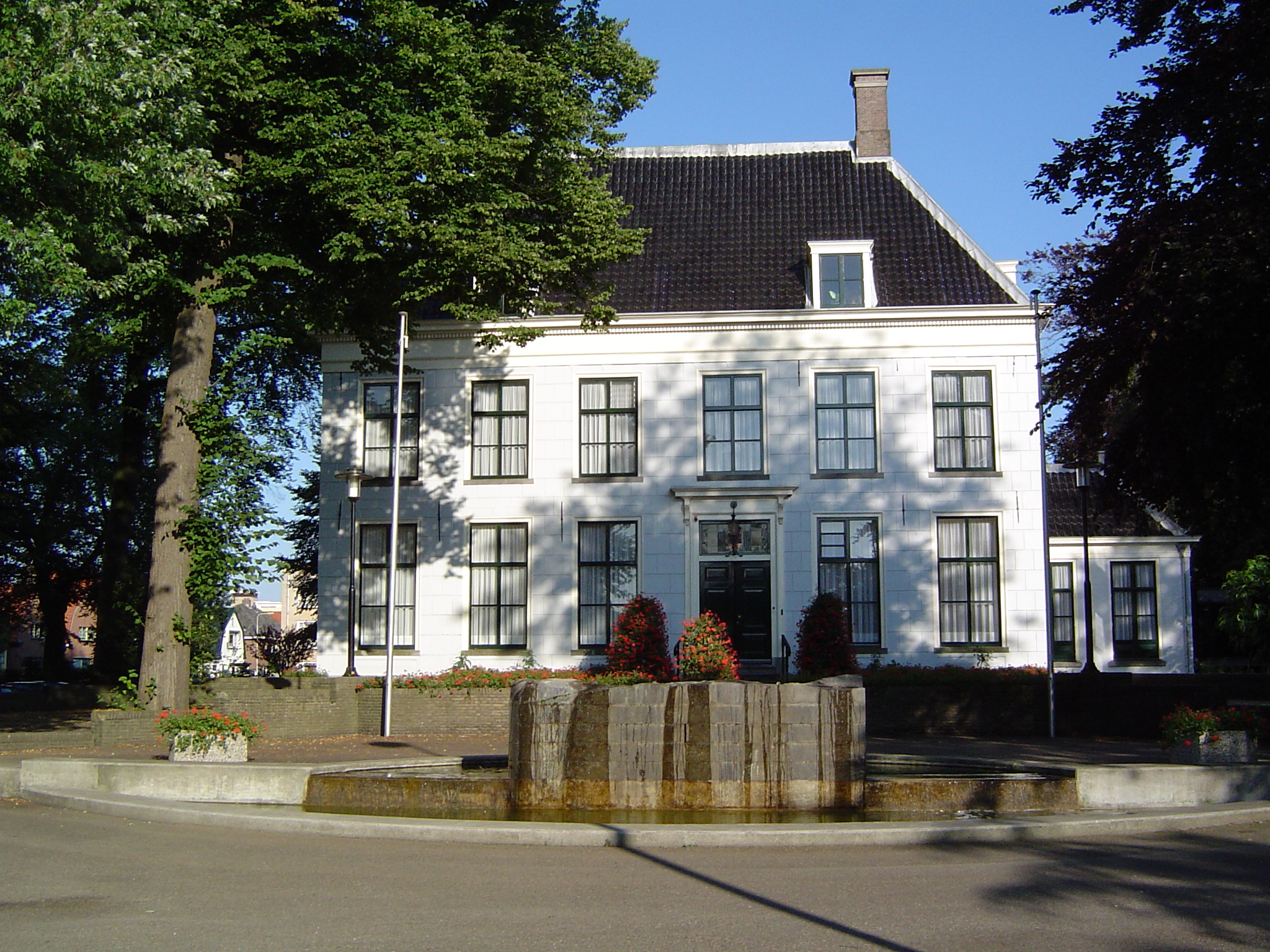 Gemeentehuis Hillegom, the Netherlands